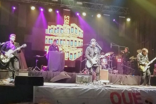 Los Tres en el festival Voy Pa Quellón 2020.